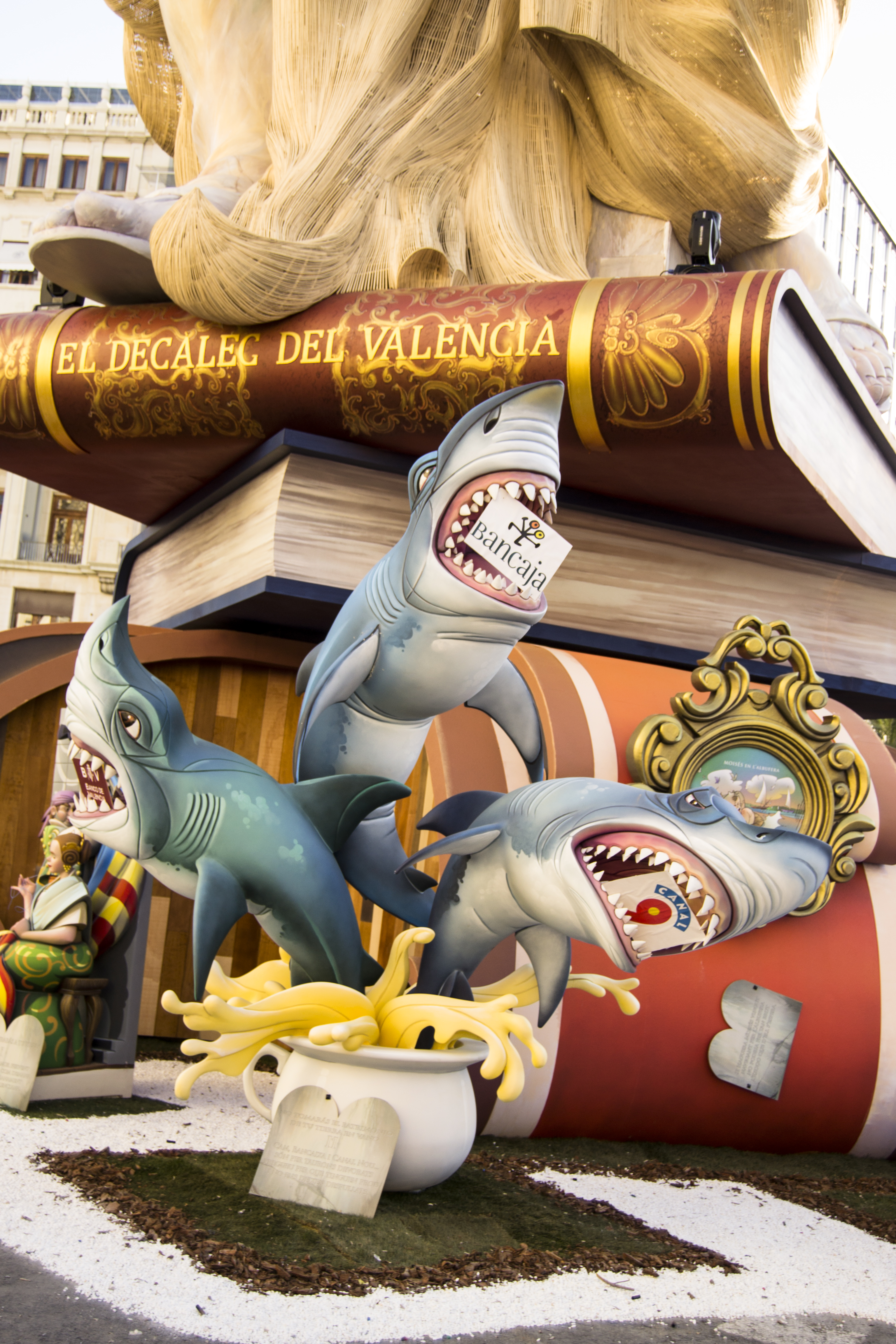 Escena de la falla.